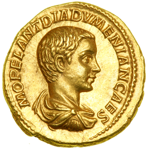 Palazzo Massimo alle Terme